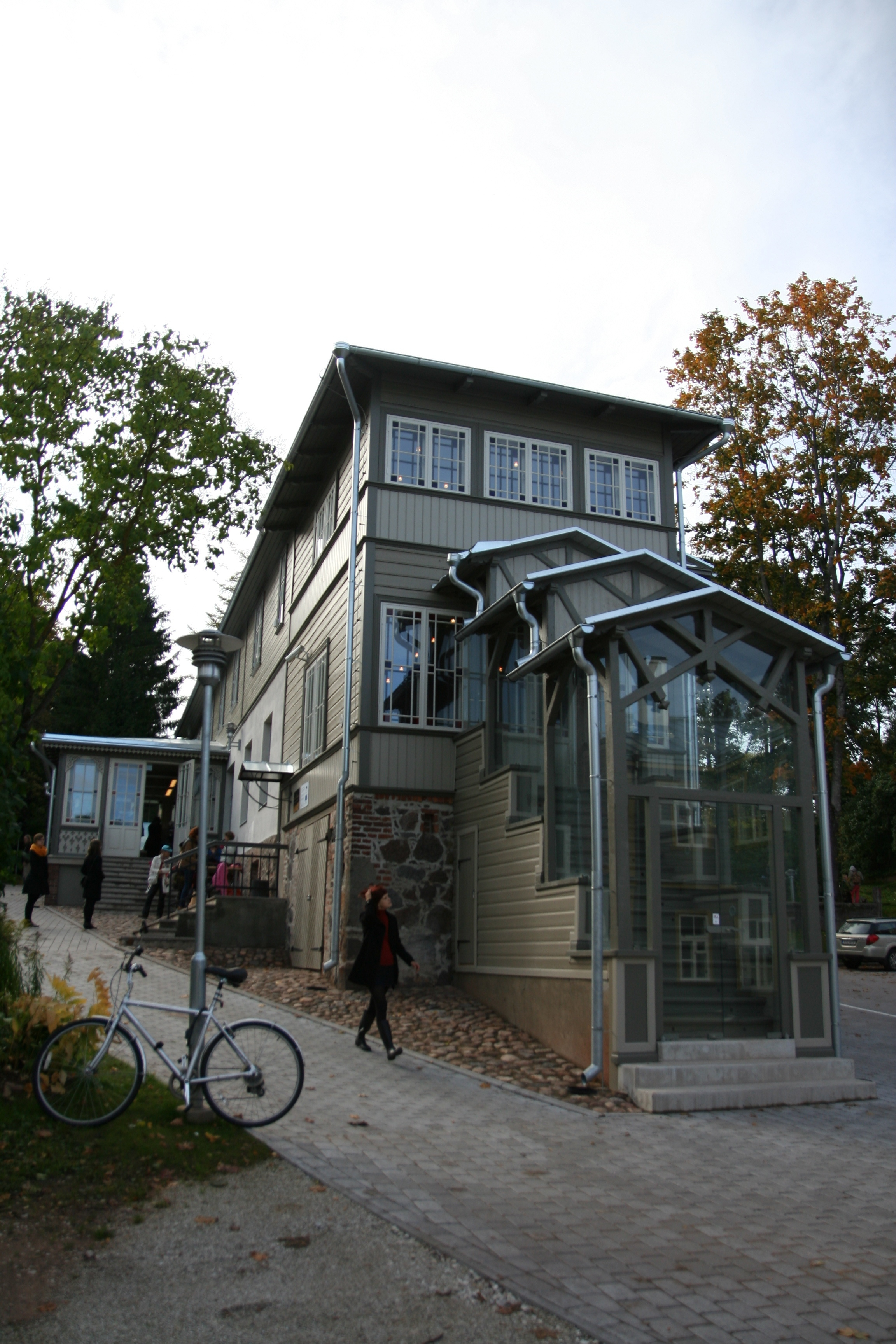 Kalevi 17